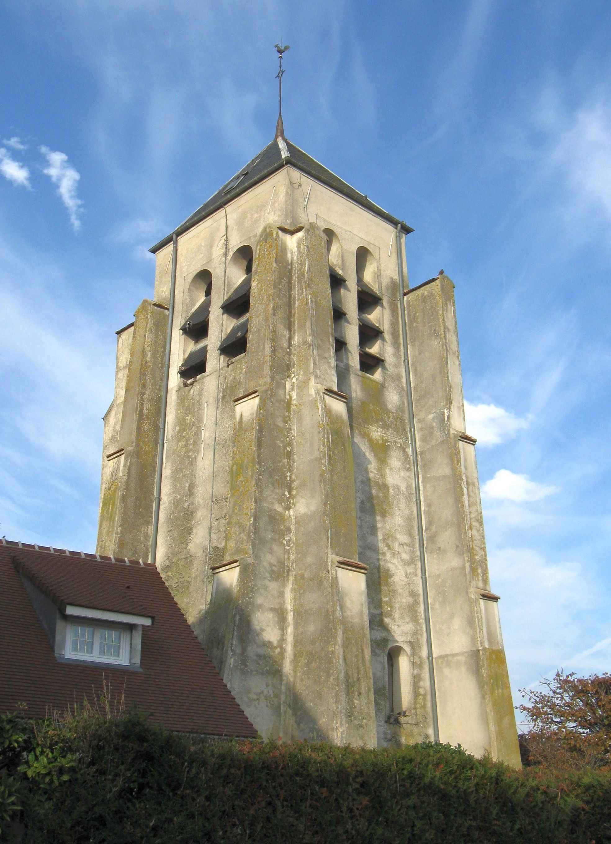 Clocher de l'ancienne église Notre-Dame-de-l'Assomption (démolie en 1903). (commune de Montry, département de la Seine-et-Marne, région Île-de-France).